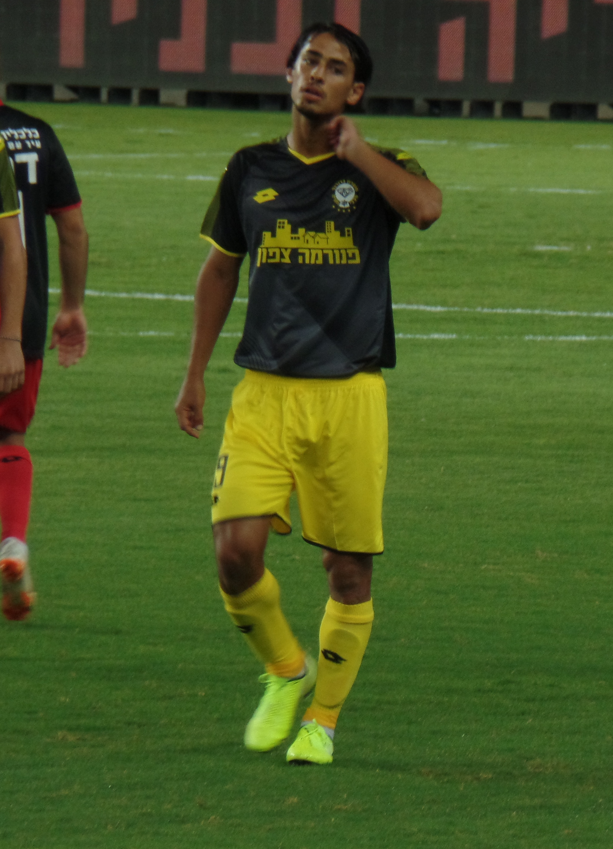 רועי קהת במדי מכבי נתניה